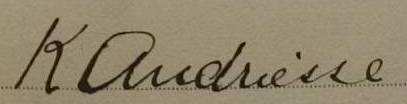 Подпись Кора Андриссе